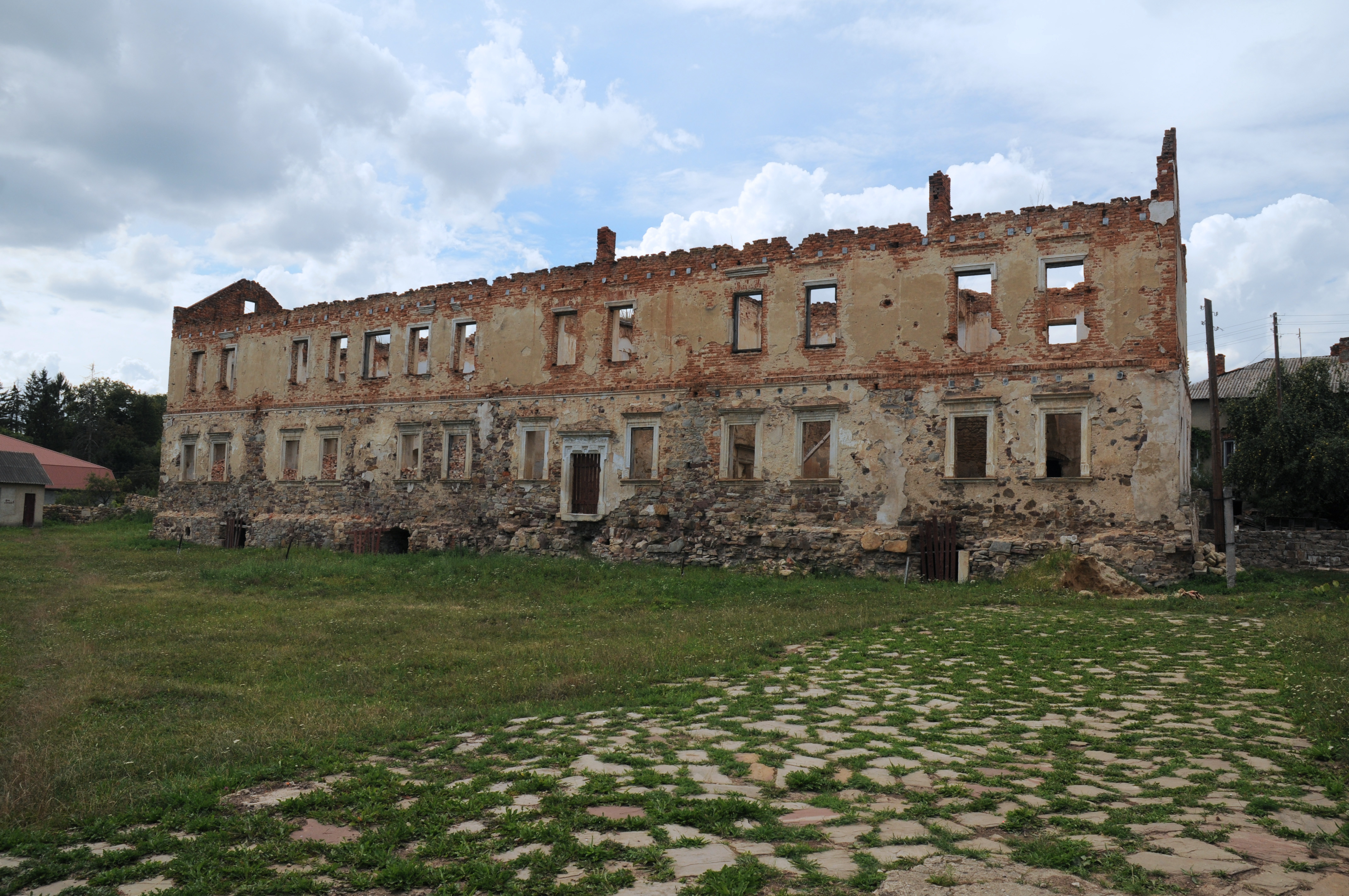 Золотий Потік, палац Потоцького